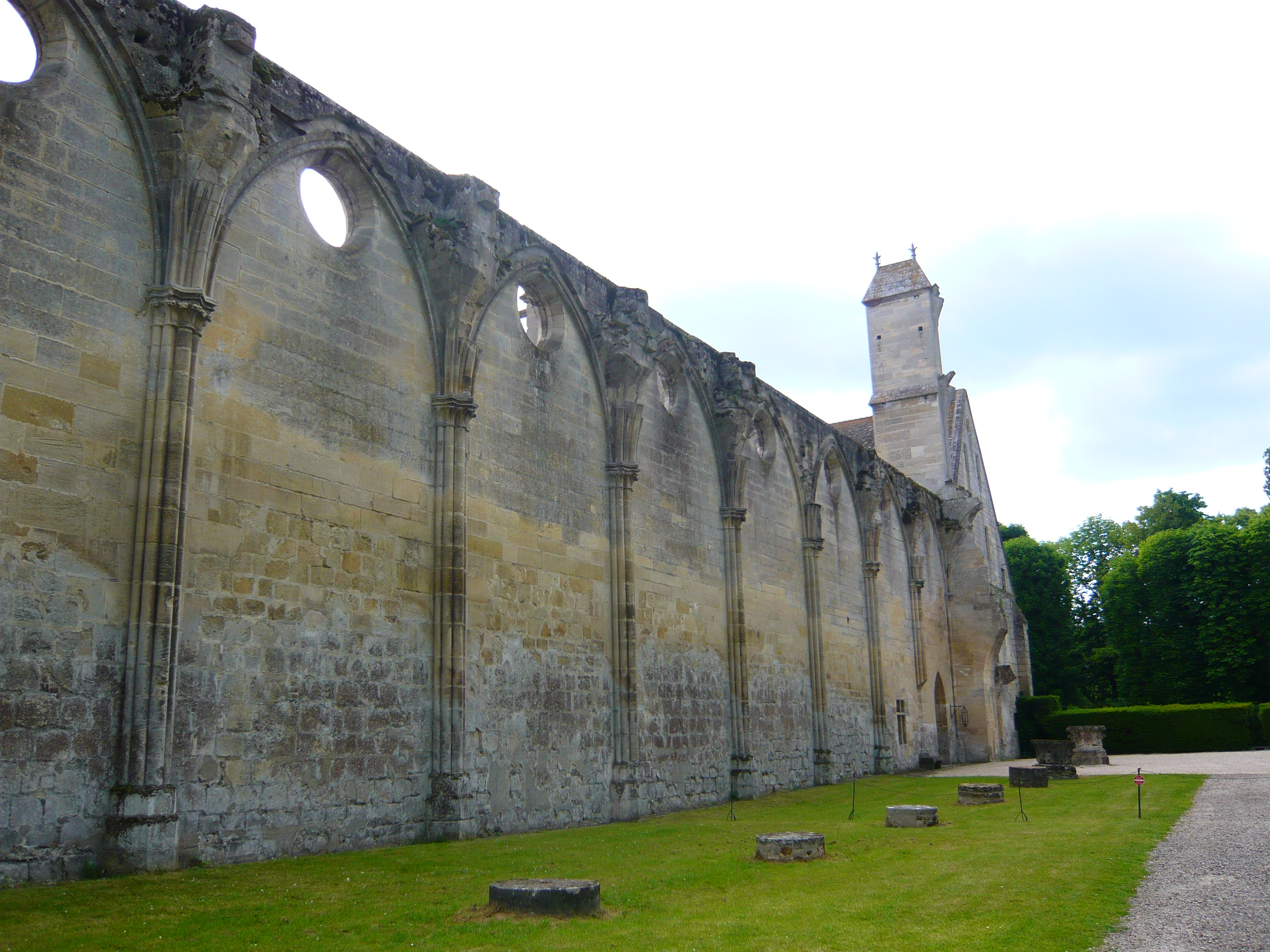 Vue depuis le nord-est sur le mur sud de l'ancienne abbatiale, présentant les vestiges des neuf travées. Au fond, l'on aperçoit le pignon nord du bâtiment des convers.